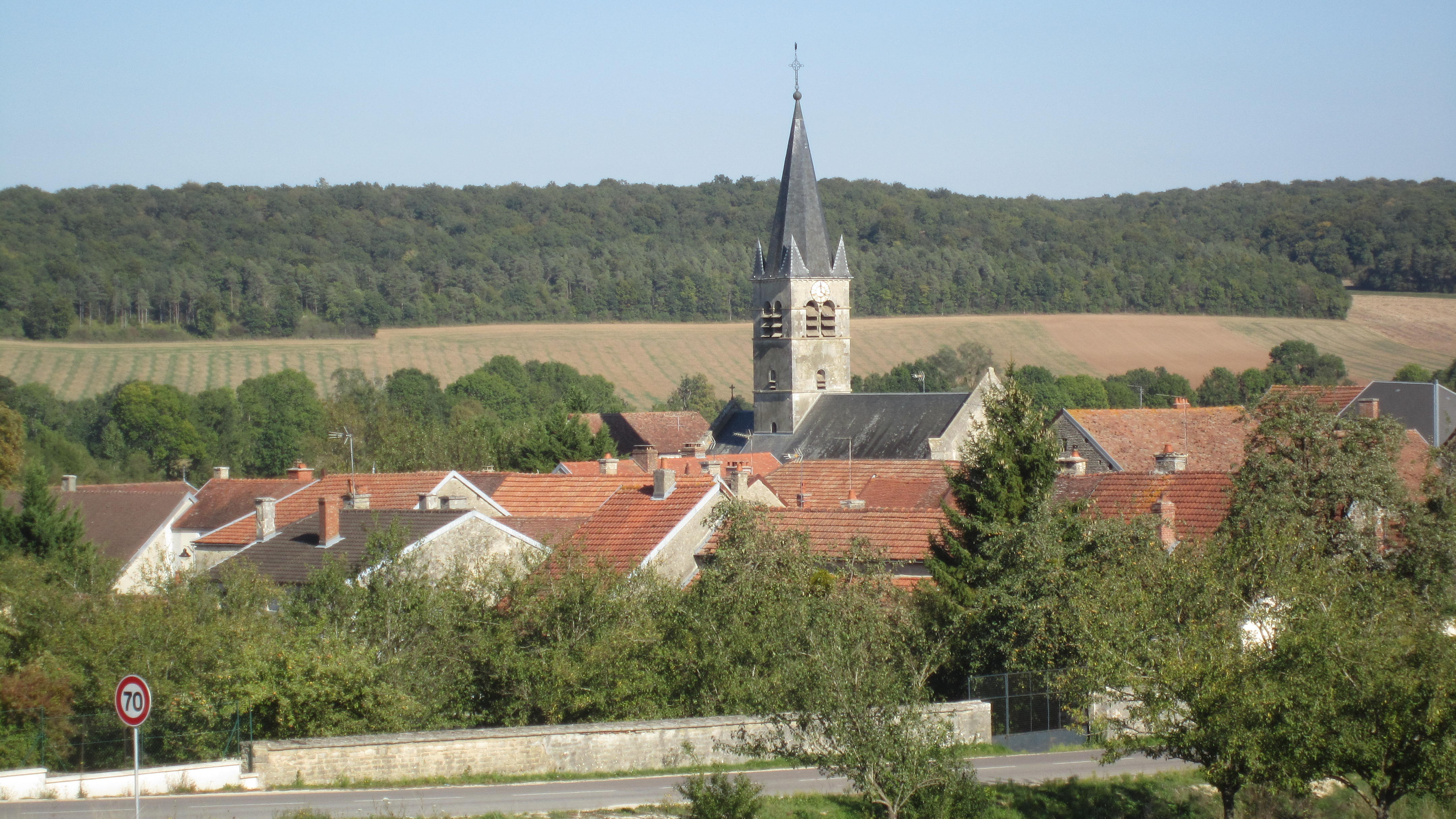 Prusly-sur-Ource (Côte-d'Or)